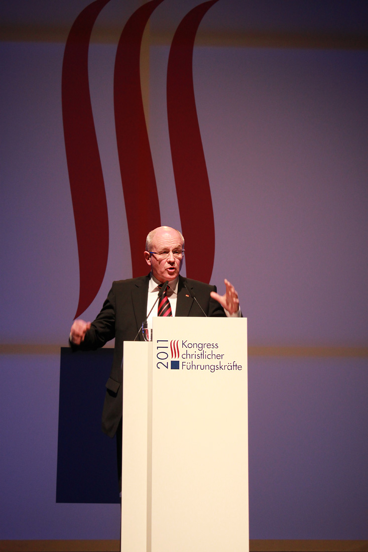 Volker Kauder auf dem Kongress christlicher Führungskräfte 2011